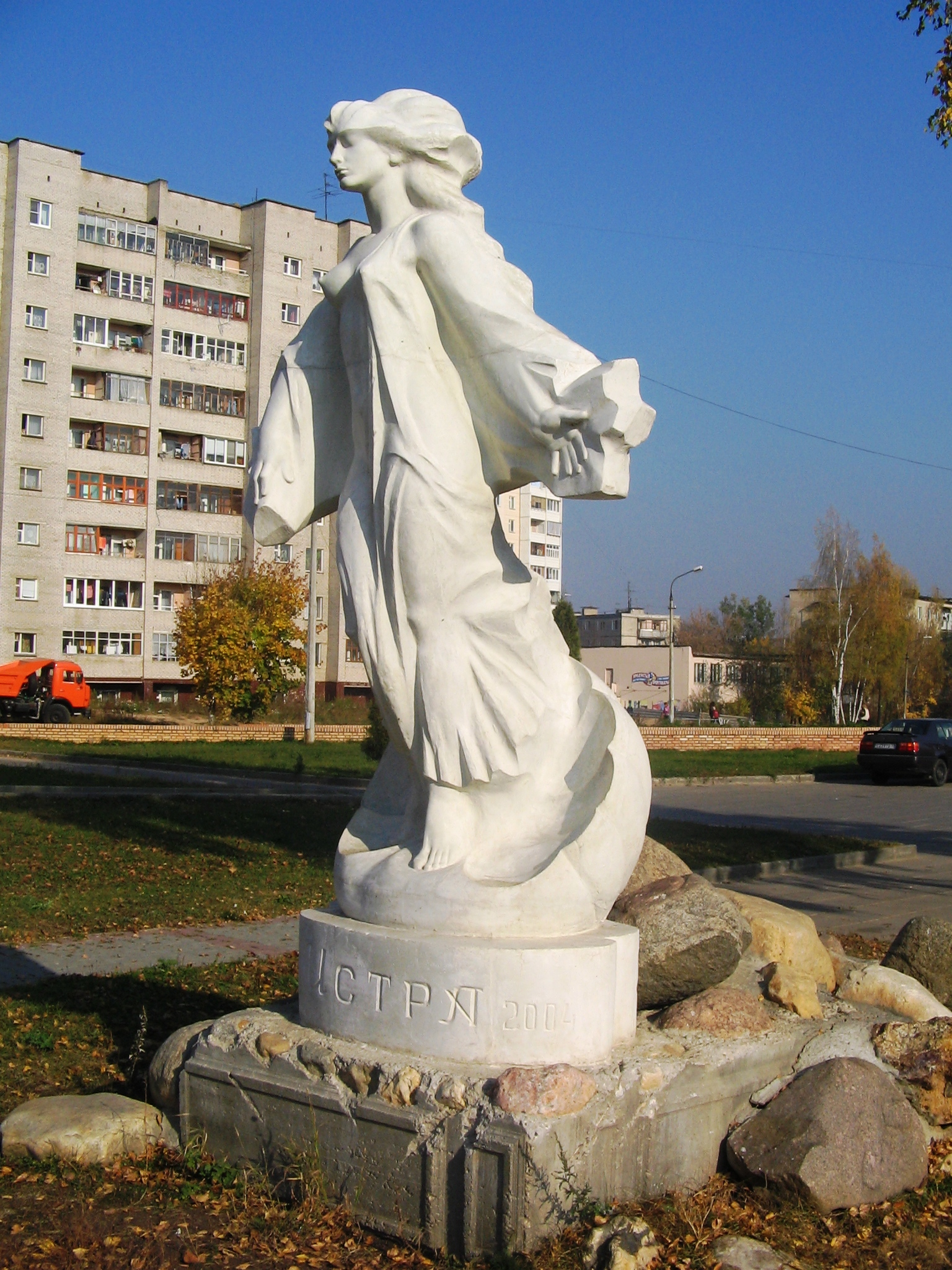 Скульптура «Истра-река» в Истре